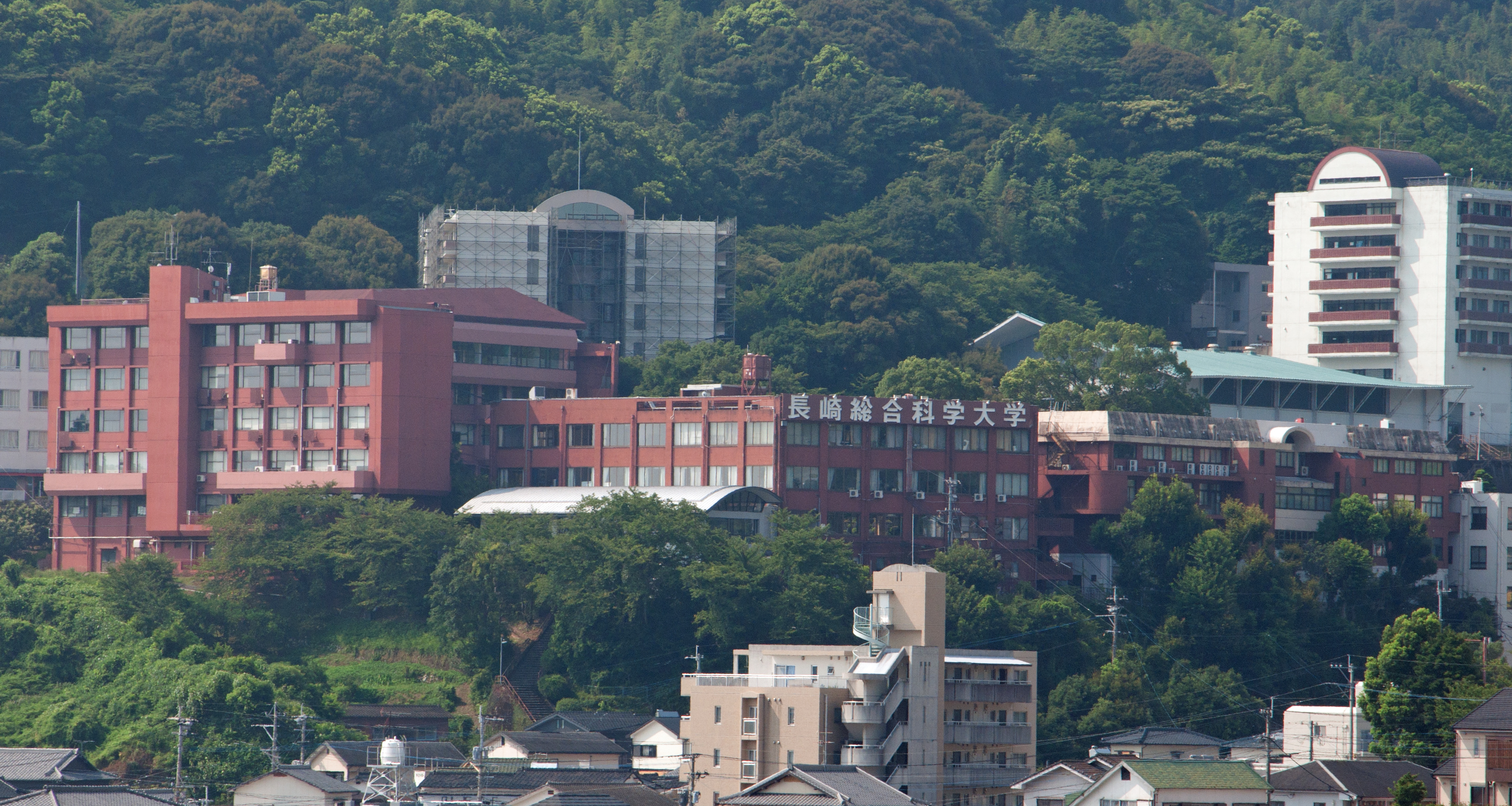 長崎総合科学大学